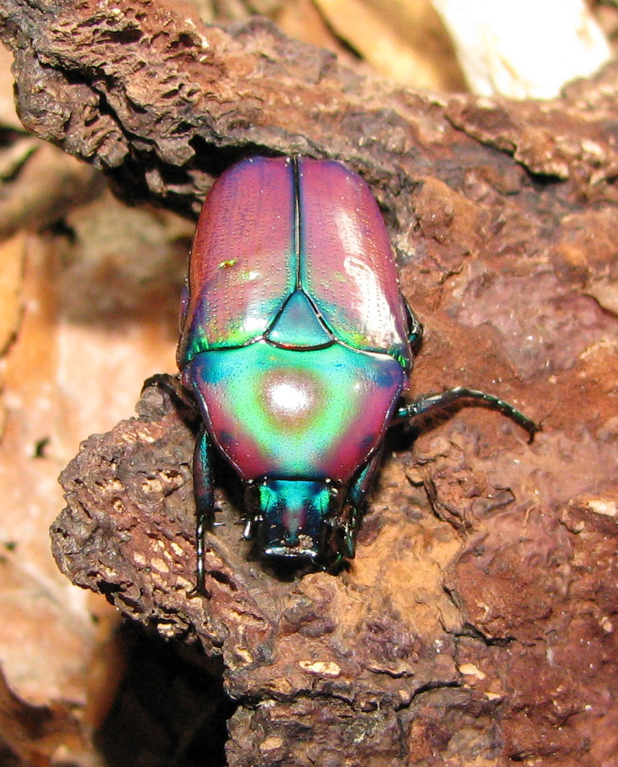 Chlorocales africana oertzeni